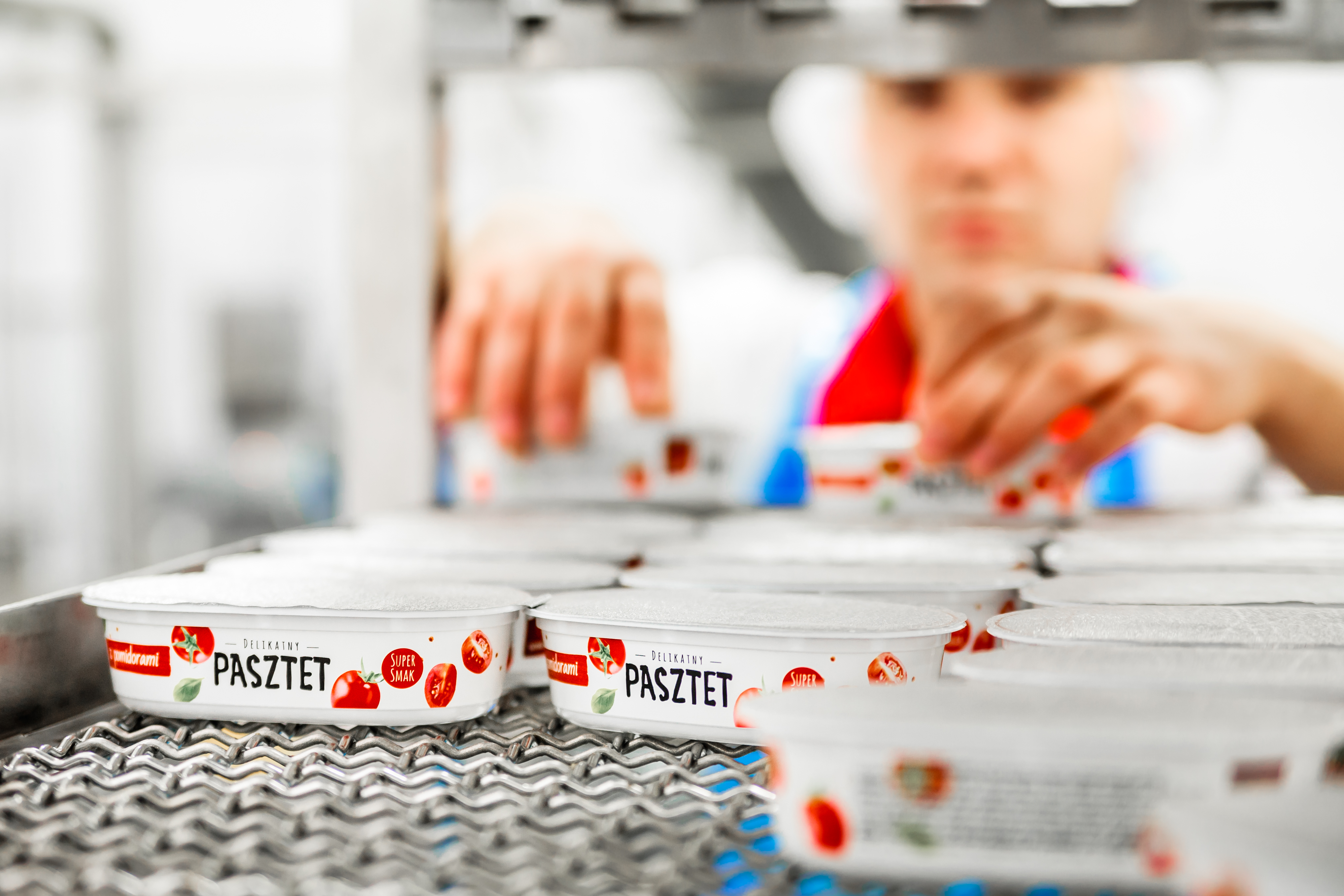 Sokołów SA - Czyżew, produkcja (3)